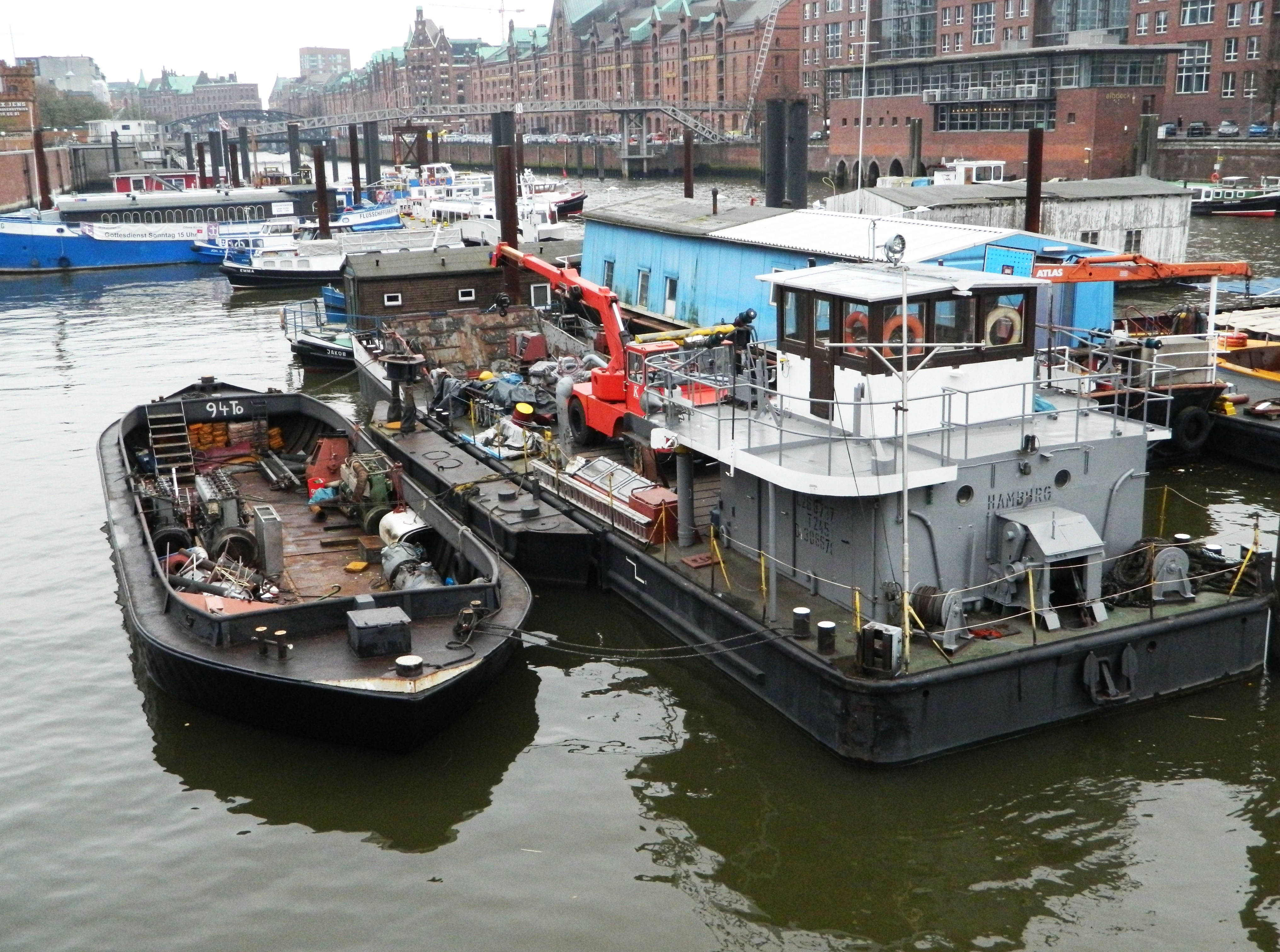 Altstadt, Hamburg, Germany